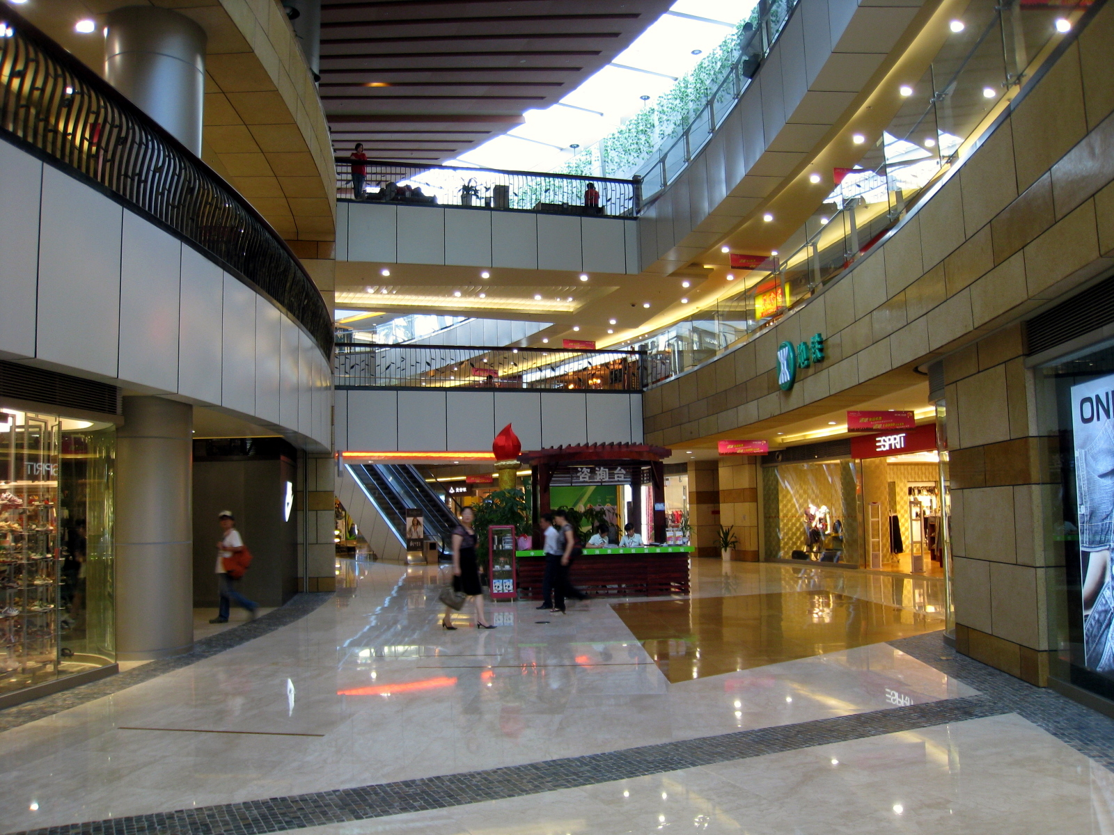 Central Walk, Shenzhen